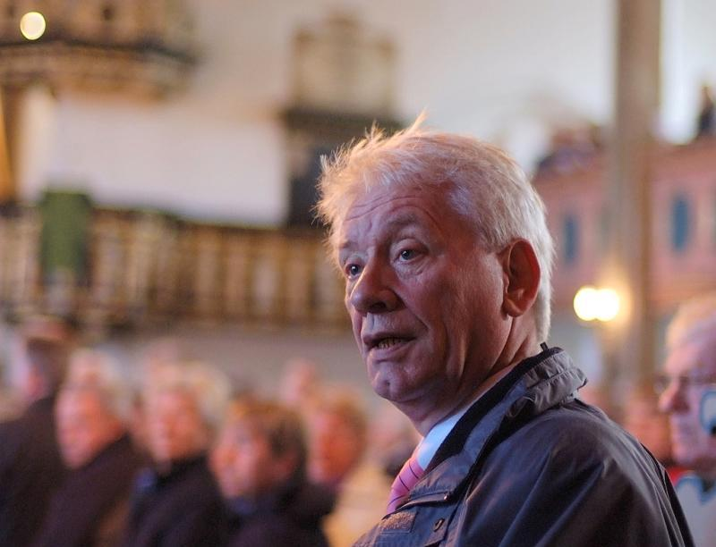 Jürgen Koppelin, Landesvorsitzender der FDP in Schleswig-Holstein, Deutschland. (Foto:Pittkowski)